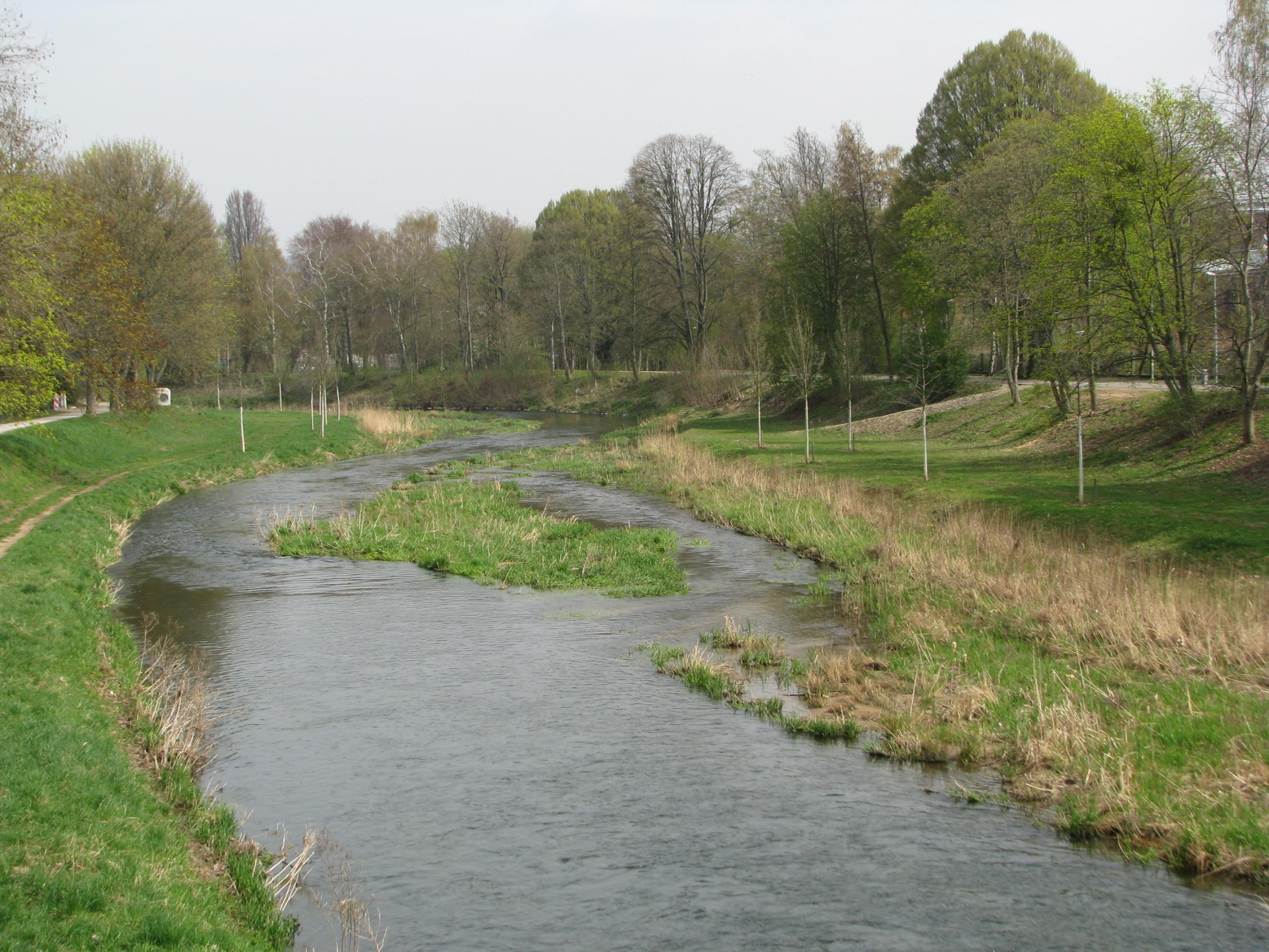 Die Leine in Göttingen (Blick von der Otto-Frey-Brücke).